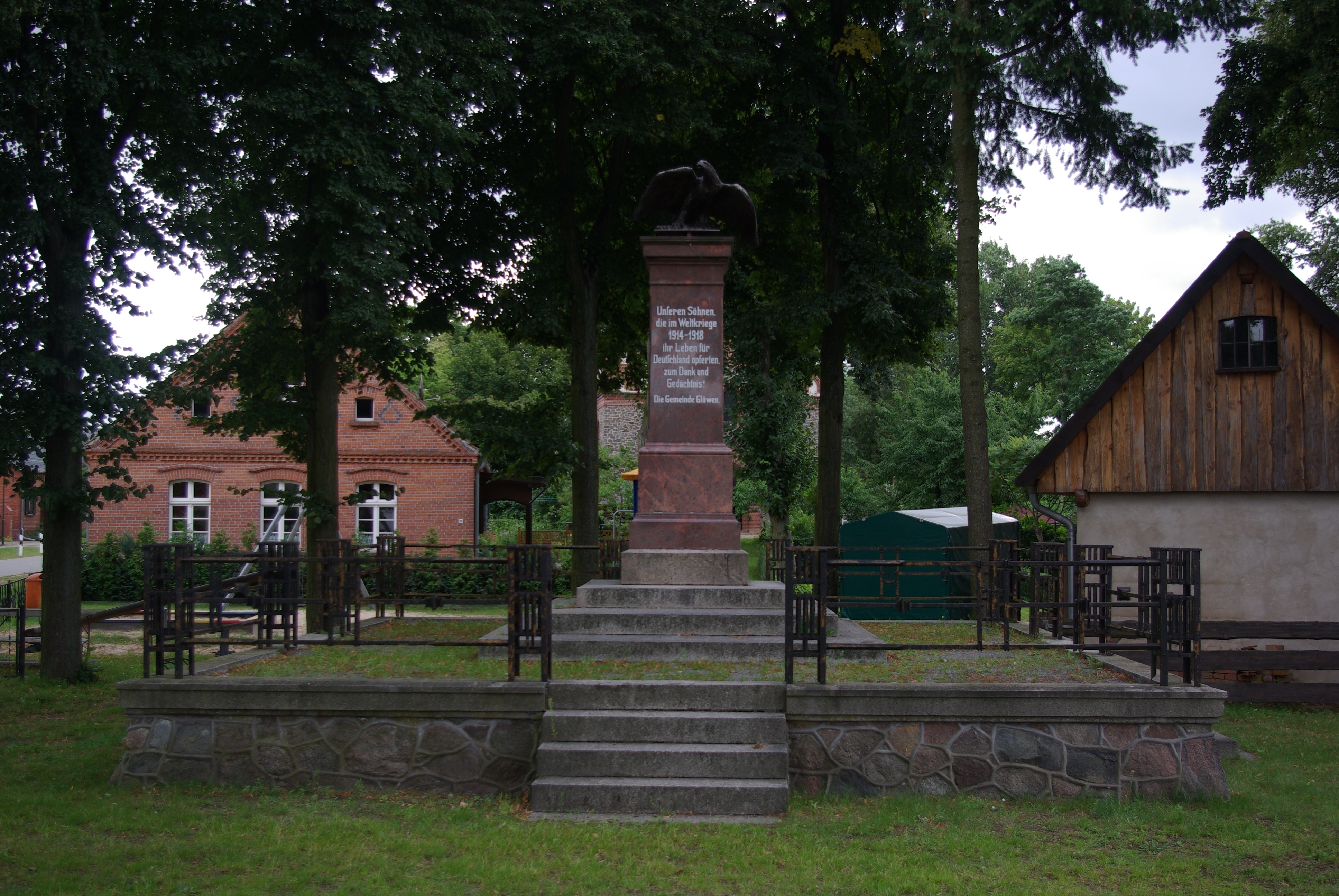 Plattenburg in Brandenburg. Das Mahnmal für die Opfer des Ersten Weltkriegs steht am Dorfplatz in der Nähe der Kirche. Das Denkmal ist geschützt.